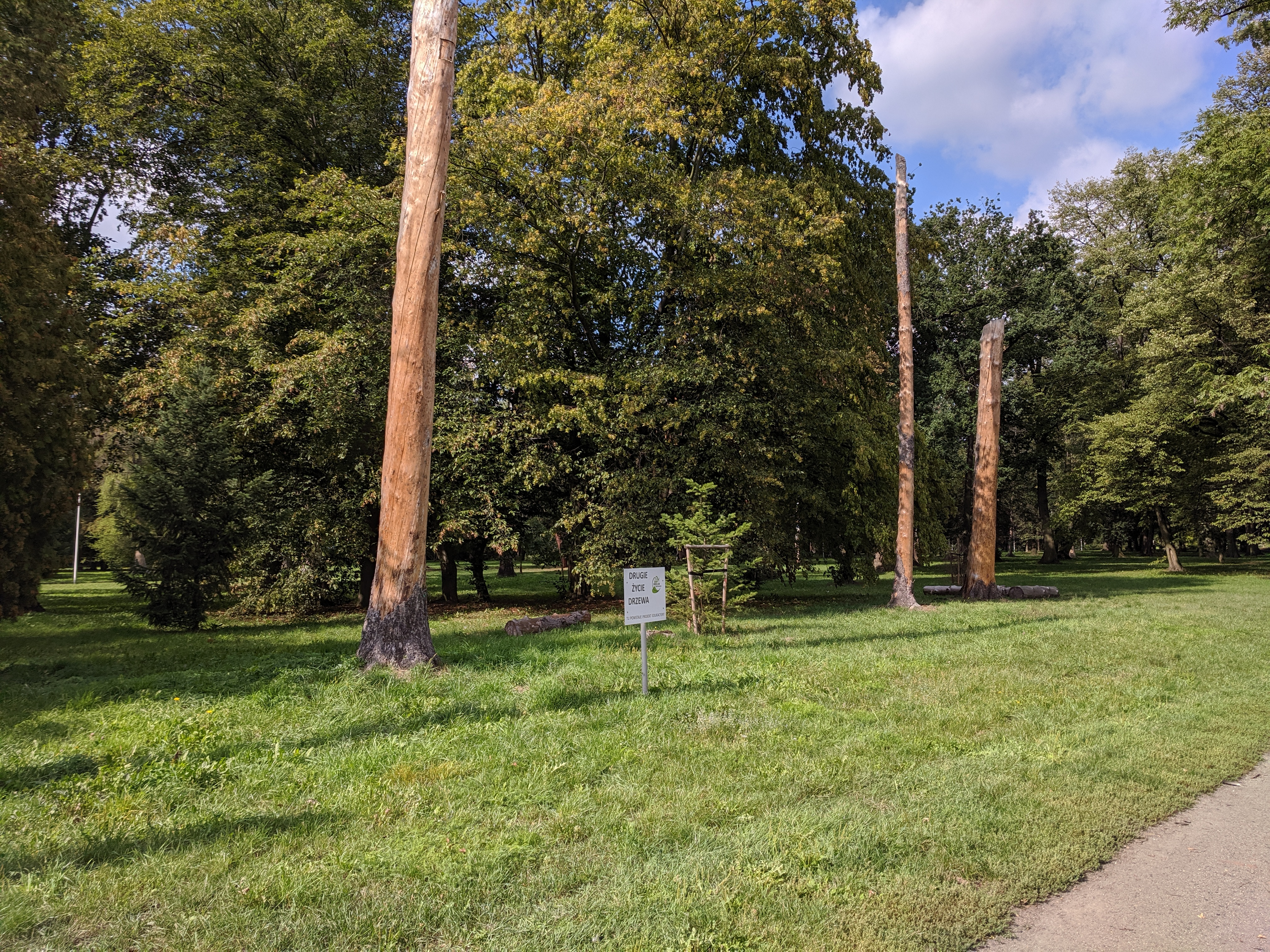 Park Skowroni Wrocław - pozostawione w ramach akcji edukacyjnej "Drugie życie drzewa" martwe drzewa w postaci tzw. świadków i kłód